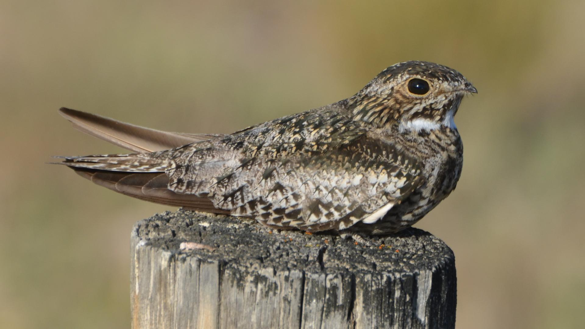 Oregon 2014